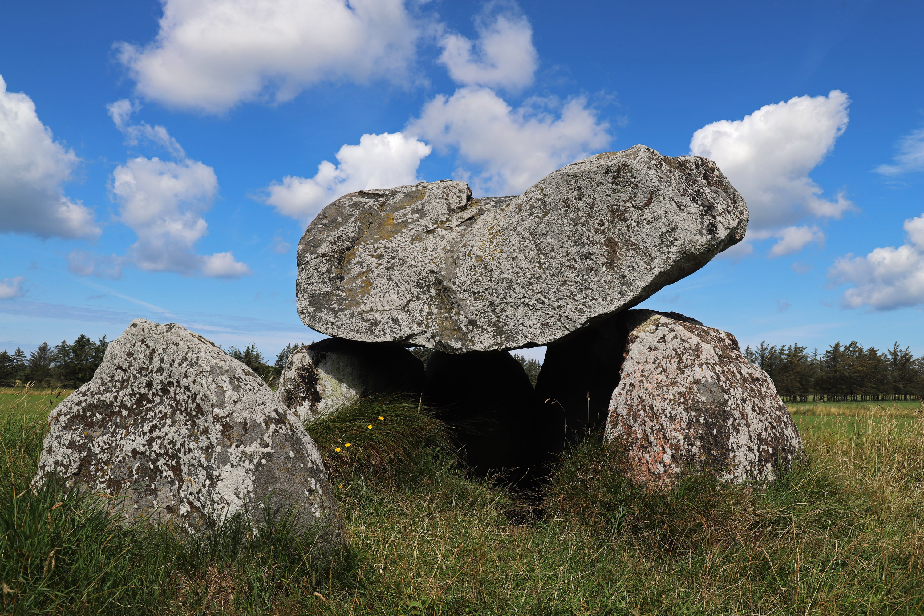 Dolmen von Tornby Dyssen - Nahaufnahme